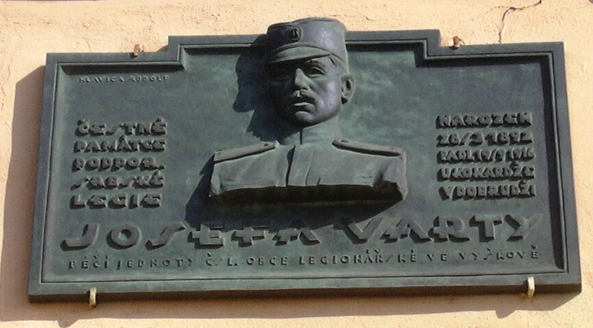 Pamětní deska Josefa Varty (Vyškov- czech republic)